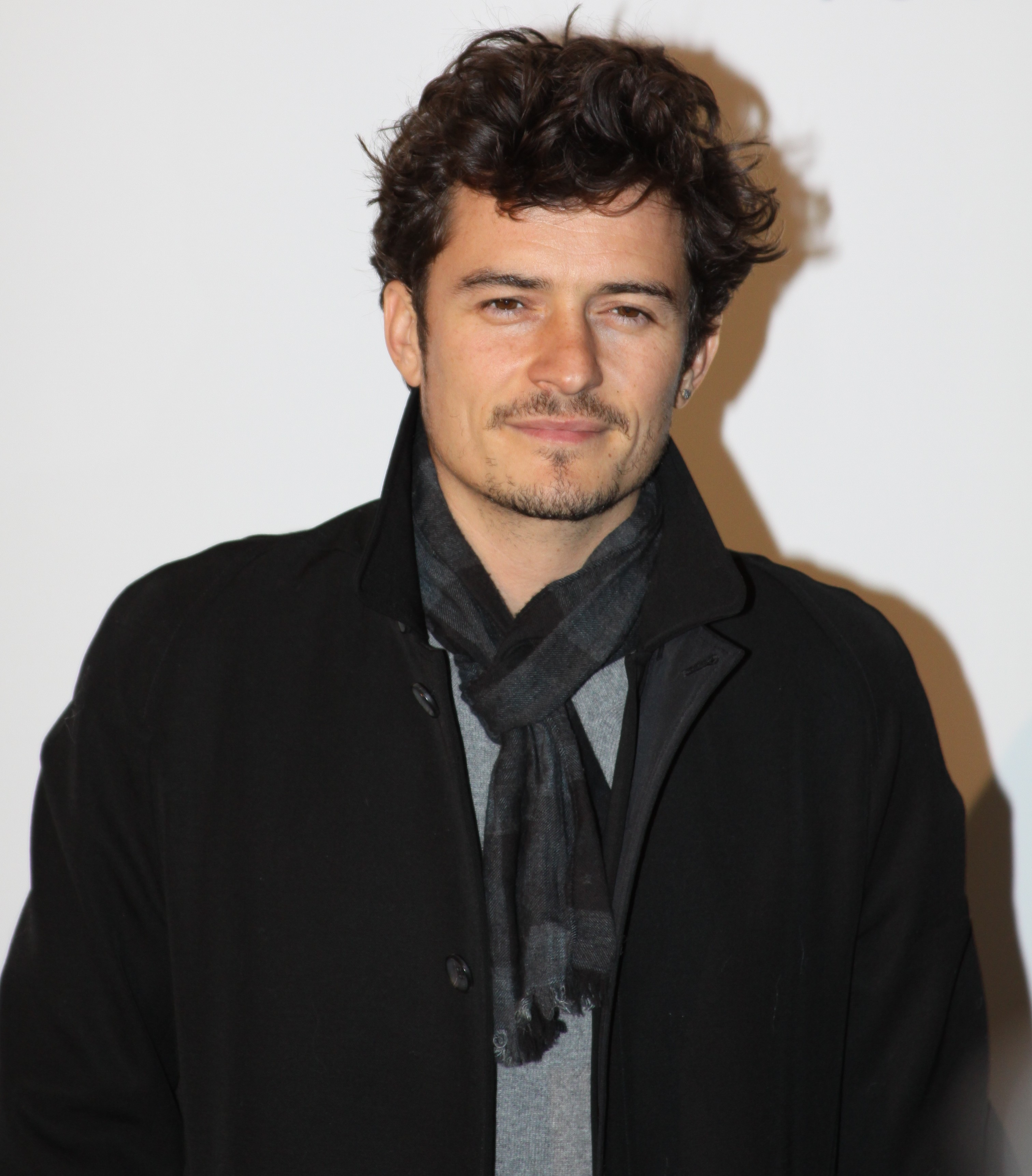 Orlando Bloom auf der Cinema for Peace Gala in Berlin am 13.11.2010